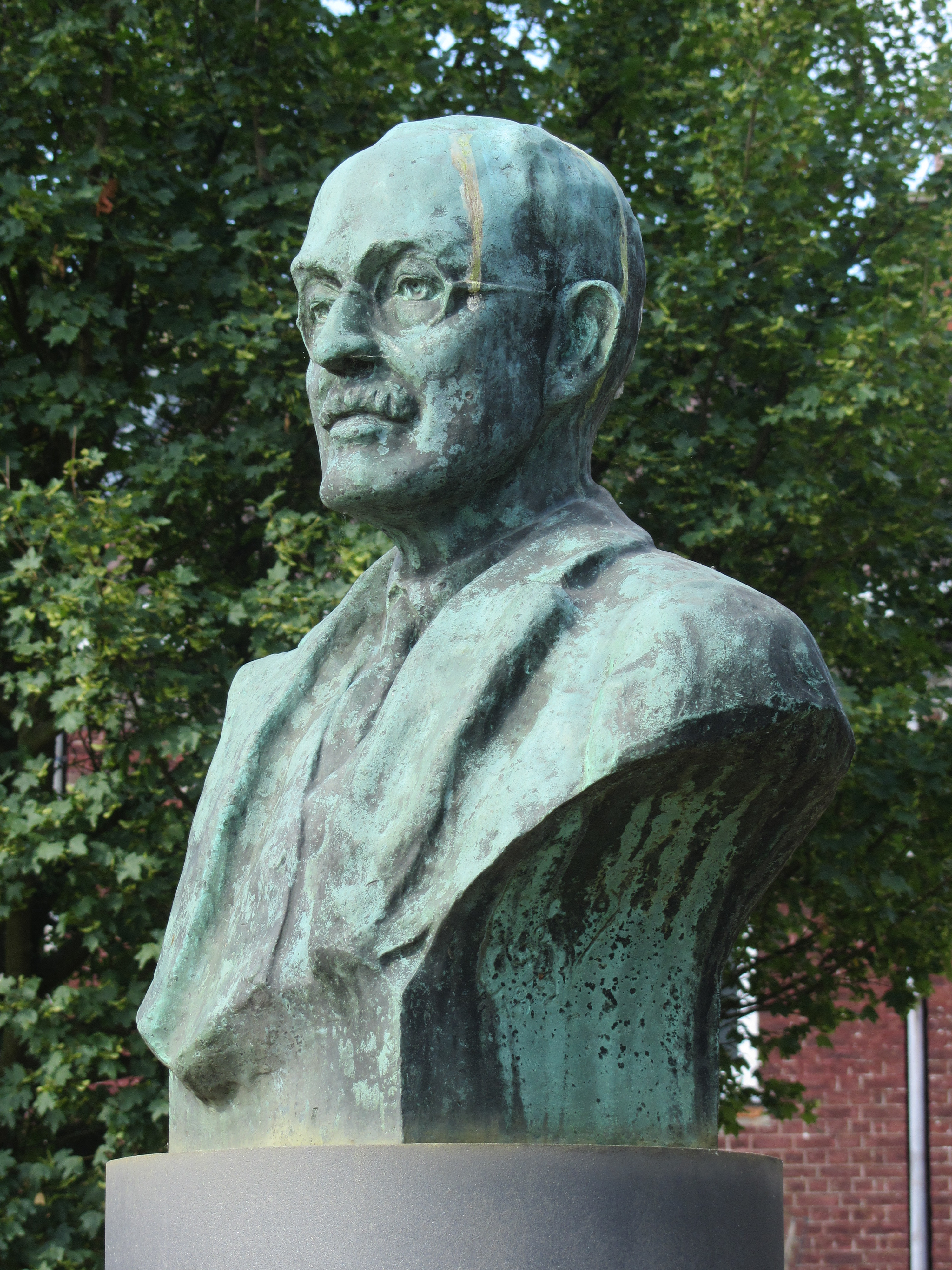 Buste de Joseph Dejardin réalisé en 1933 par Louis Gérardy, place Joseph Dejardin à Grivegnée (Liège Belgique)